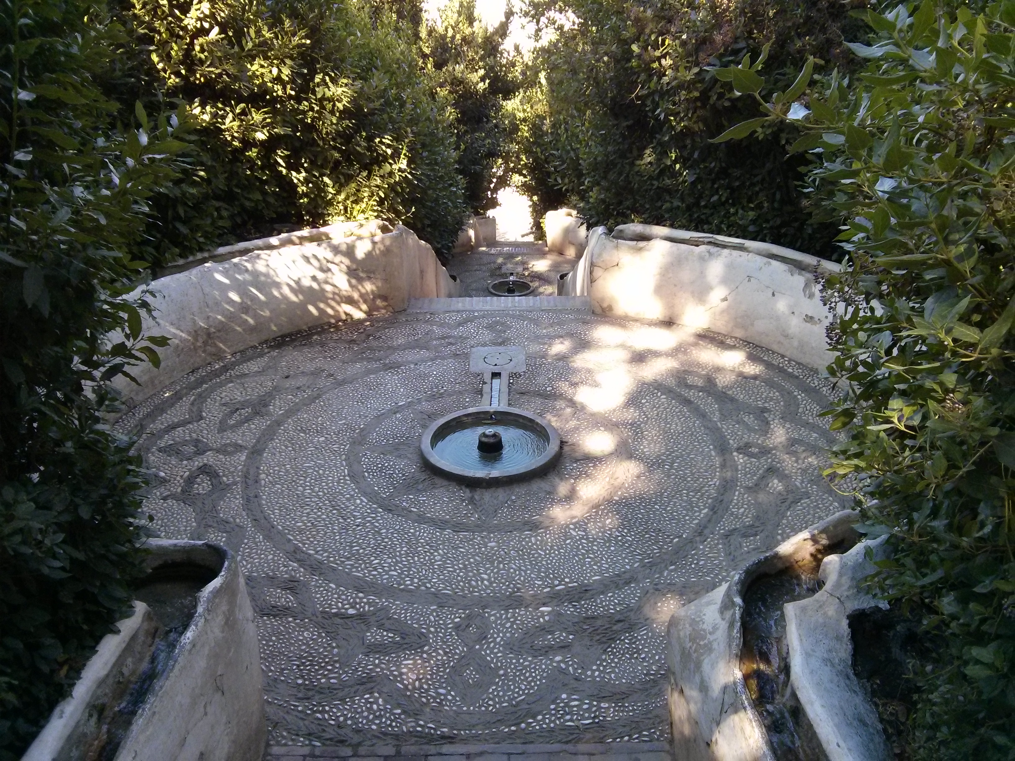 Alhambra in Granada, Spain